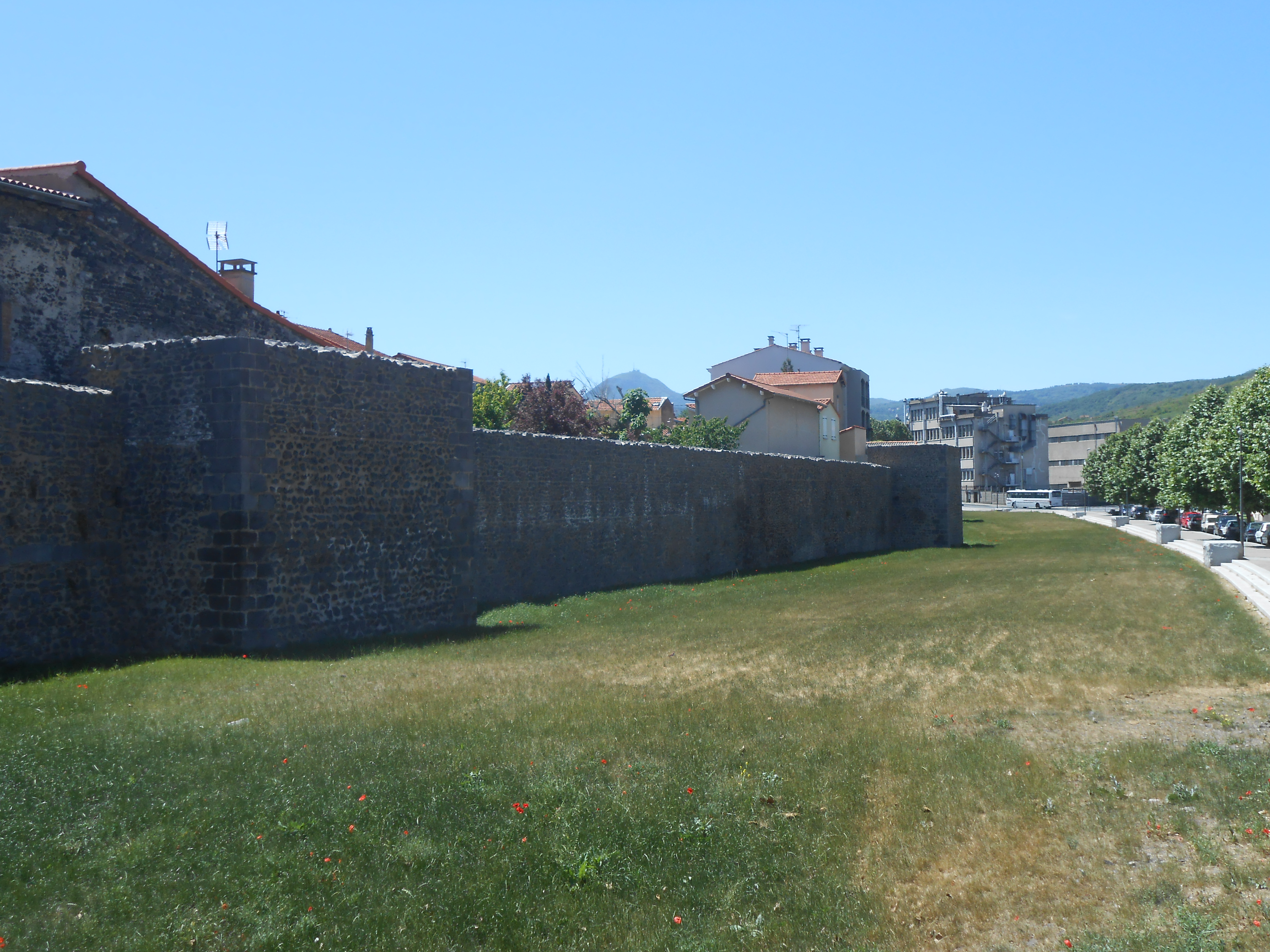 Remparts de Montferrand, Clermont-Ferrand, Auvergne.